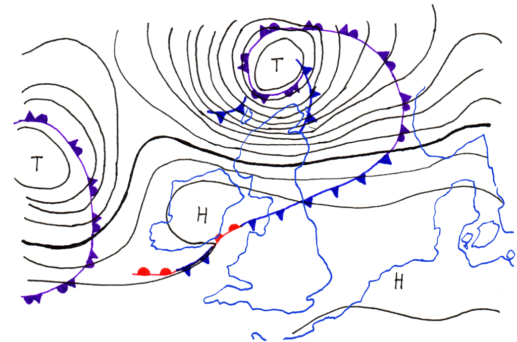 Isobaren während eines Orkans über England